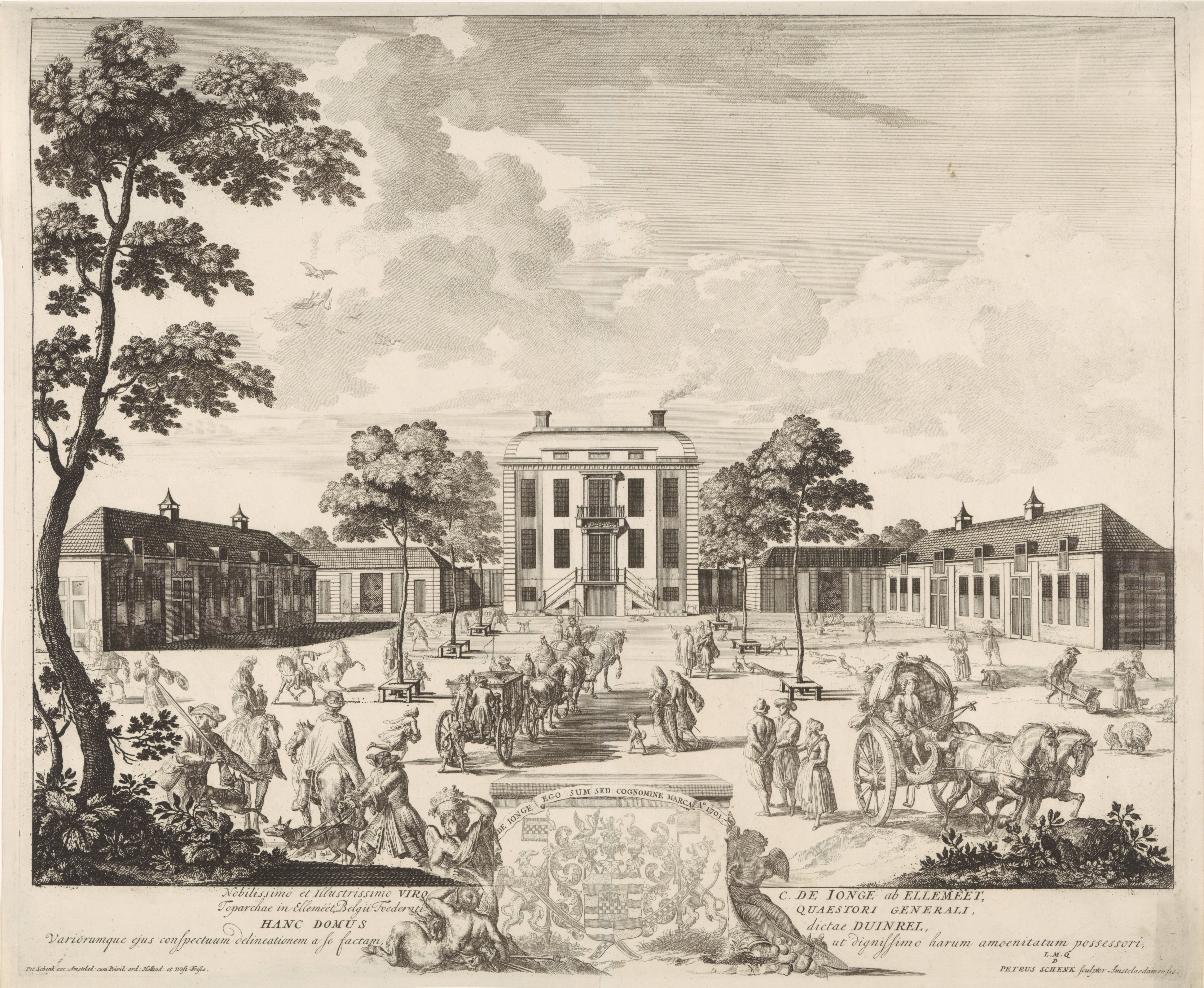 RP-P-1910-2127